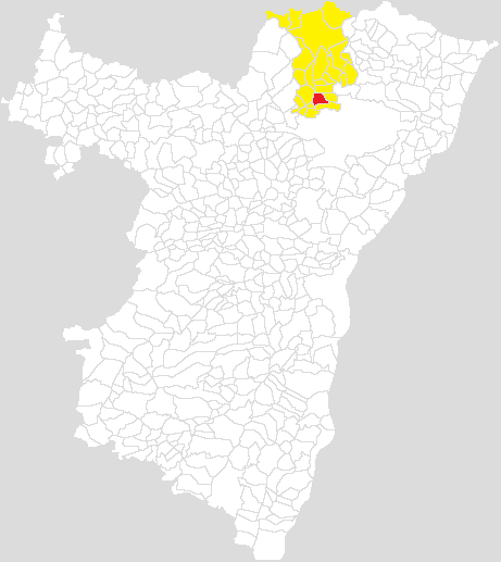 Communauté de communes Sauer-Pechelbronn